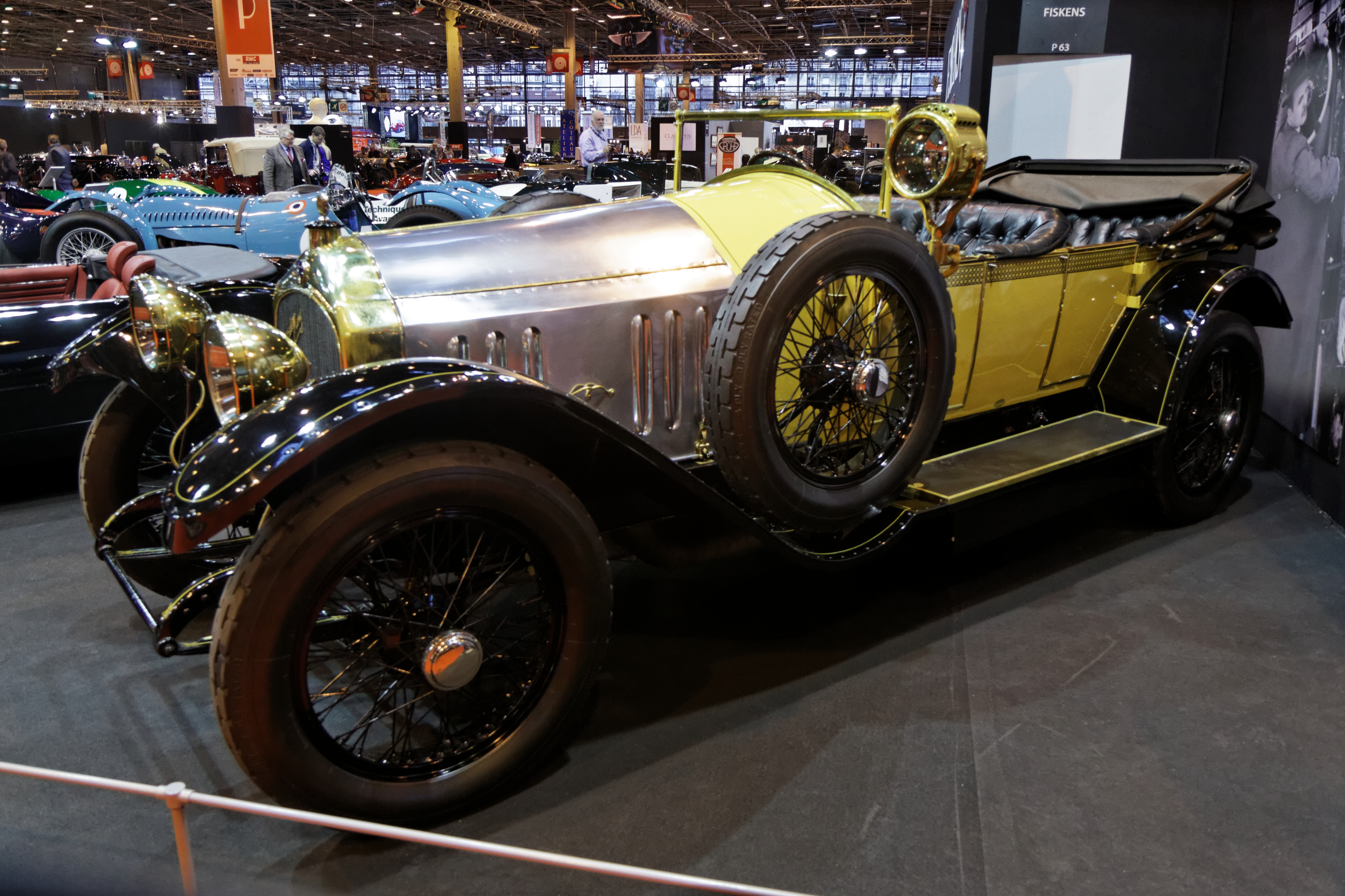 Une Turcat-Méry model MJ Boulogne Roadster exposée lors du salon Retromobile 2014.